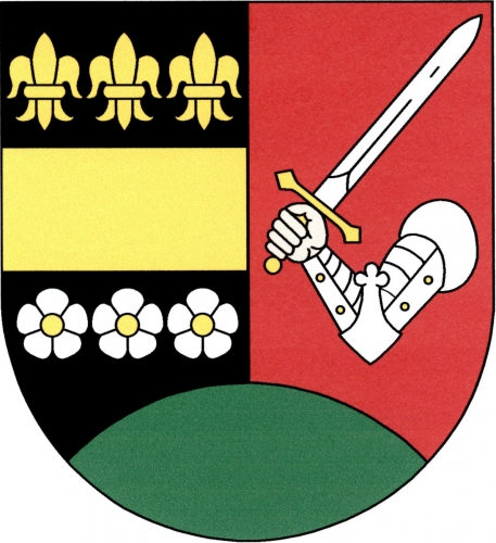 znak, Smilovy Hory, okres Tábor